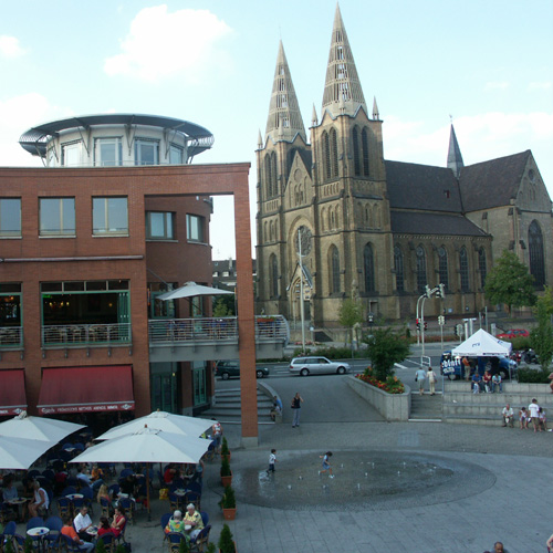 Solingen Mitte Clemensgalerie und Kirche